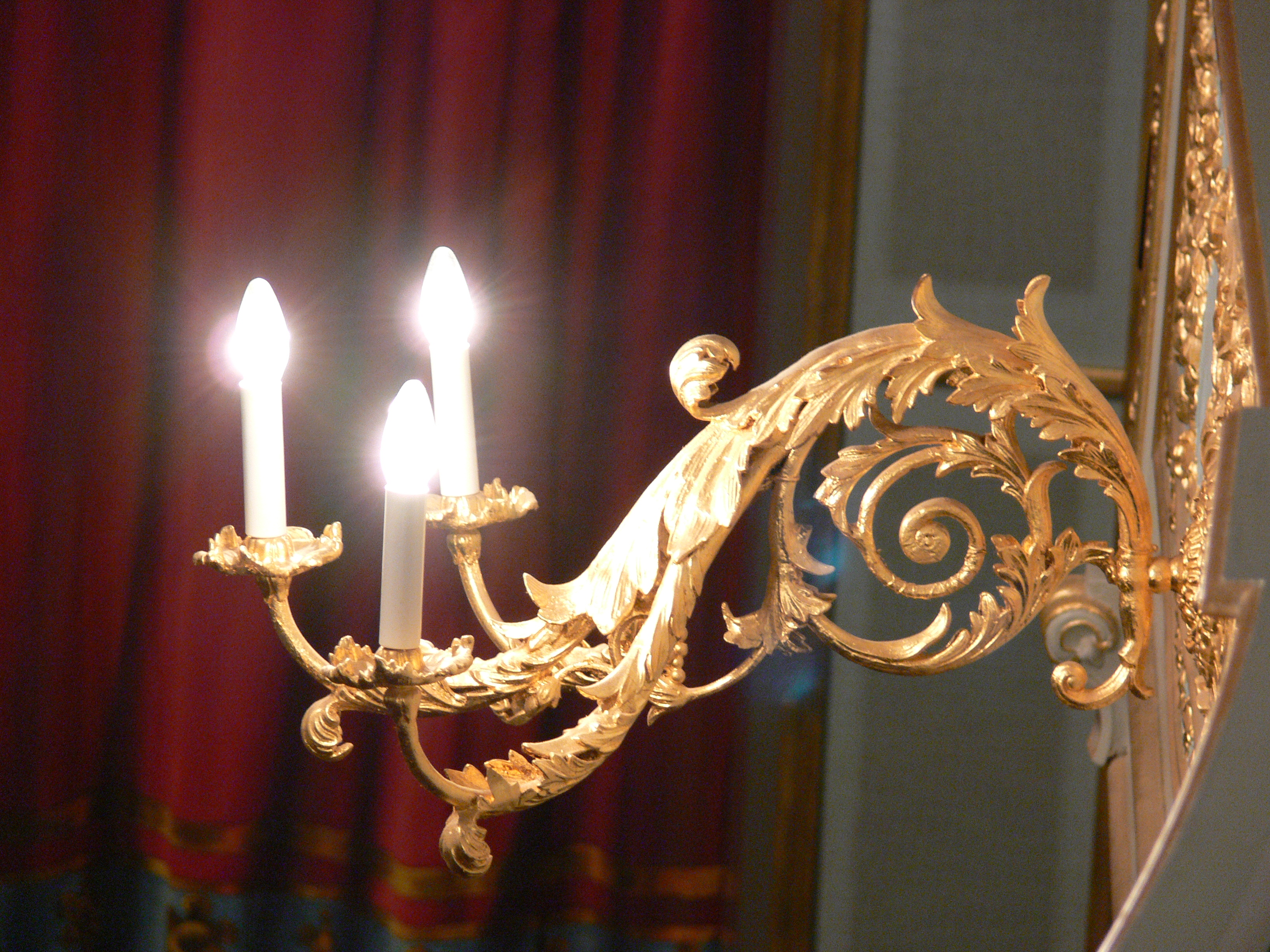 E.T.A.-Hoffmann-Theater Bamberg Leuchter